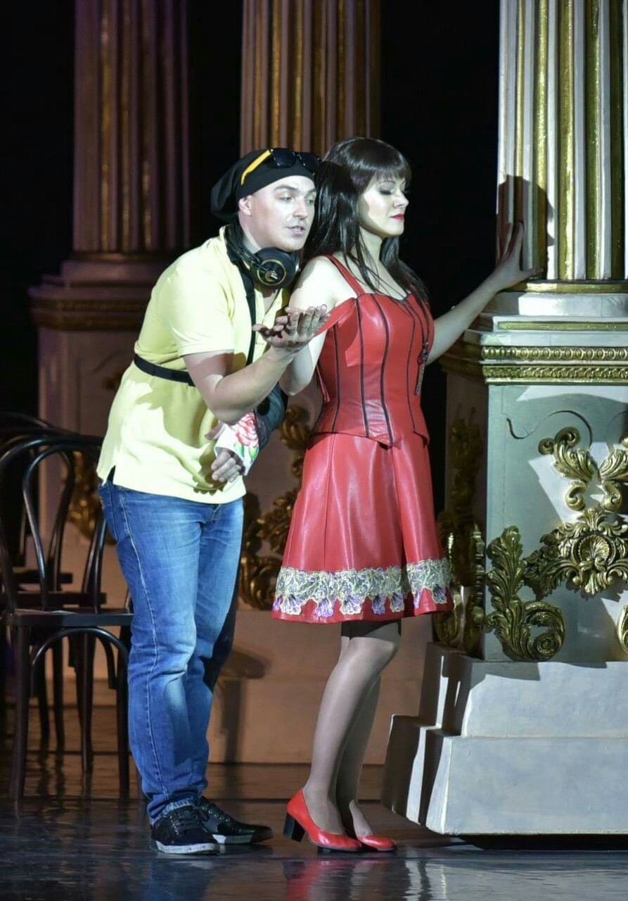 Севільскький цирюльник, Театр оперети 04.2017, Київ